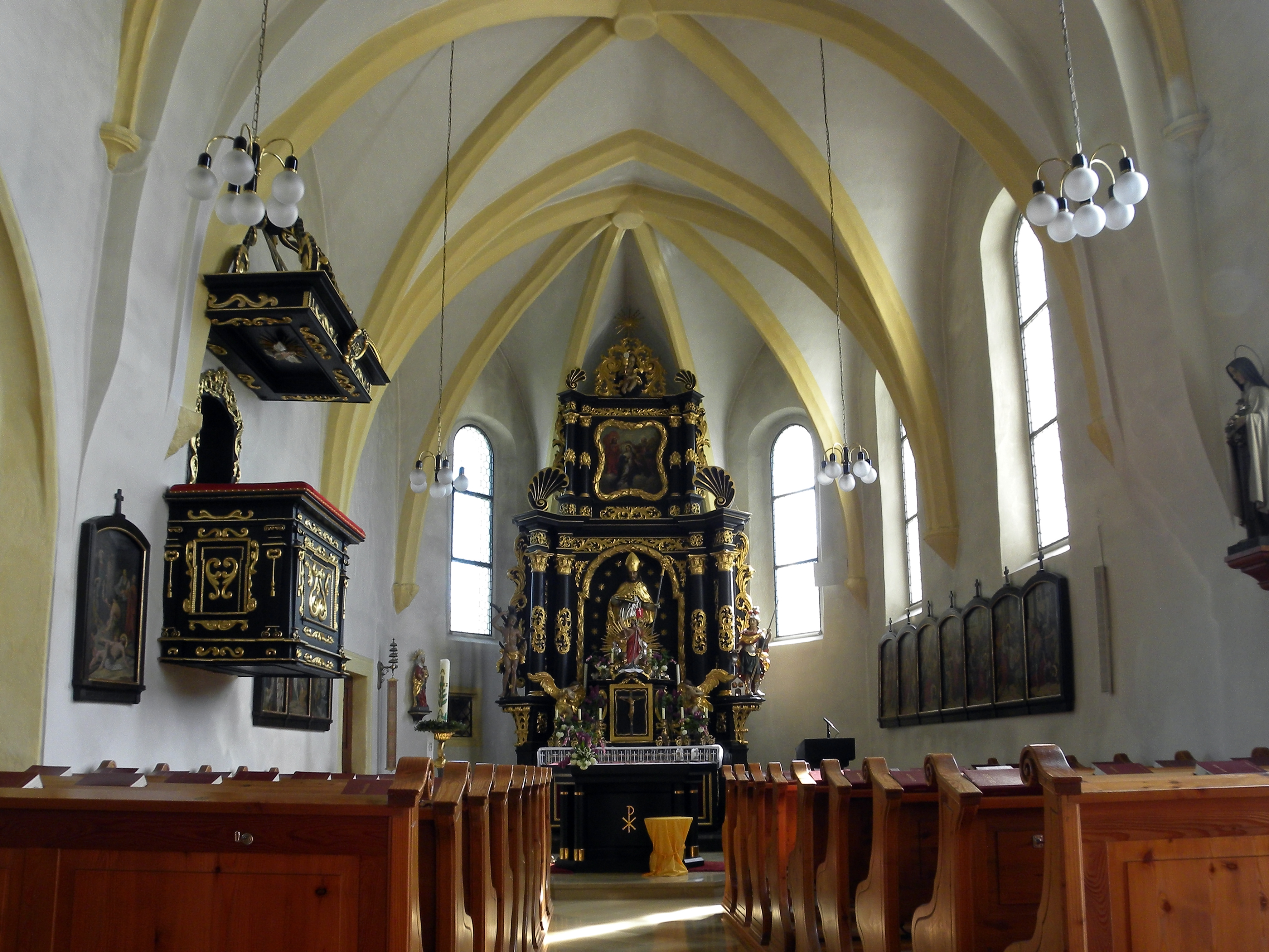 Innenansicht der Pfarrkirche Sankt Nikolaus in Windhag